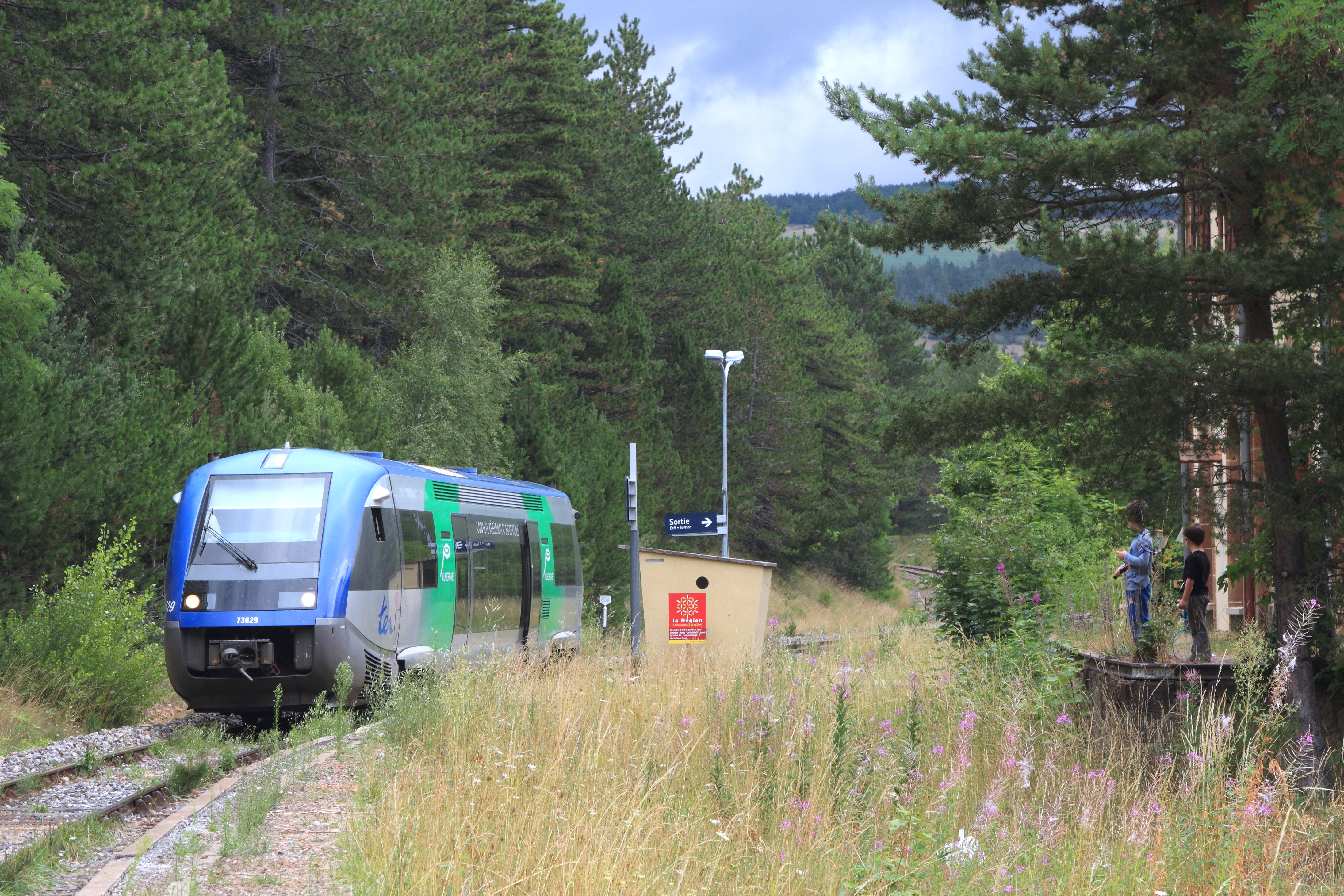 L'X 73629 en livrée Auvergne, dessert la halte de Bagnols - Chadenet, en Lozère, sur le TER 878980 (La BAstide - Marvejols).